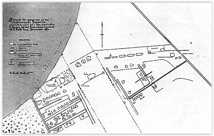 Uitmetingskaart etablissement Batavia te Suriname, landmeter Zeger Weyers, 1836